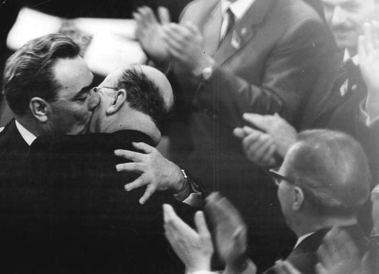 Zentralbild Kohls 18.4.1967 Bgm-Qu VII. Parteitag der SED - 18.4.1967. Erhebende Manifestation der Verbundenheit zwischen der SED und der KPdSU - die Umarmung zwischen dem Ersten Sekretär des ZK der SED, Walter Ulbricht, und dem Generalsekretär des ZK der KPdSU, Leonid Breshnew (Links).